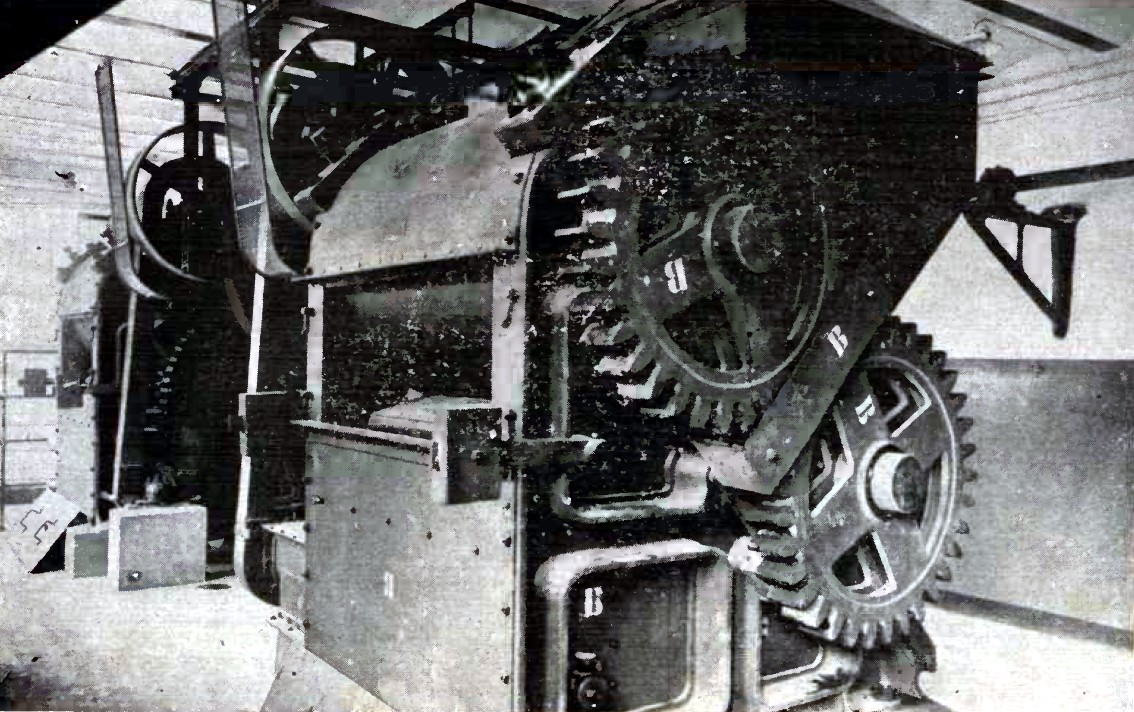 Pansenpresse der Maschinenbauanstalt Venuleth & Ellenberger, Darmstadt